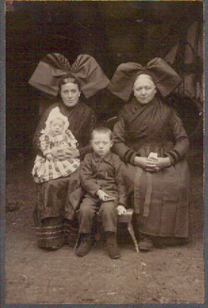 La famille Finitzer vers 1915. Photographie prise vers 1915 pour le père de famille Georges Finitzer (Alteckendorf, 1881-Alteckendorf, 1965), soldat du Deuxième Reich allemand sur le front russe. A droite, la mère du soldat Marie Catherine Burger (Kirrwiller, 1850- Bischwiller, 1942), est accompagnée de Marguerite Reinhardt (Alteckendorf, 1885- Alteckendorf, 1960) avec ses deux fils, Georges (Alteckendorf, 1909- Alteckendorf, 1984) et Michel.